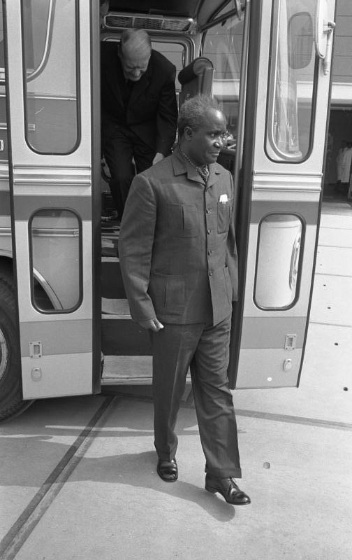 Staatsbesuch Sambia, Präsident Kenneth D. Kaunda Farbwerke Hoechst